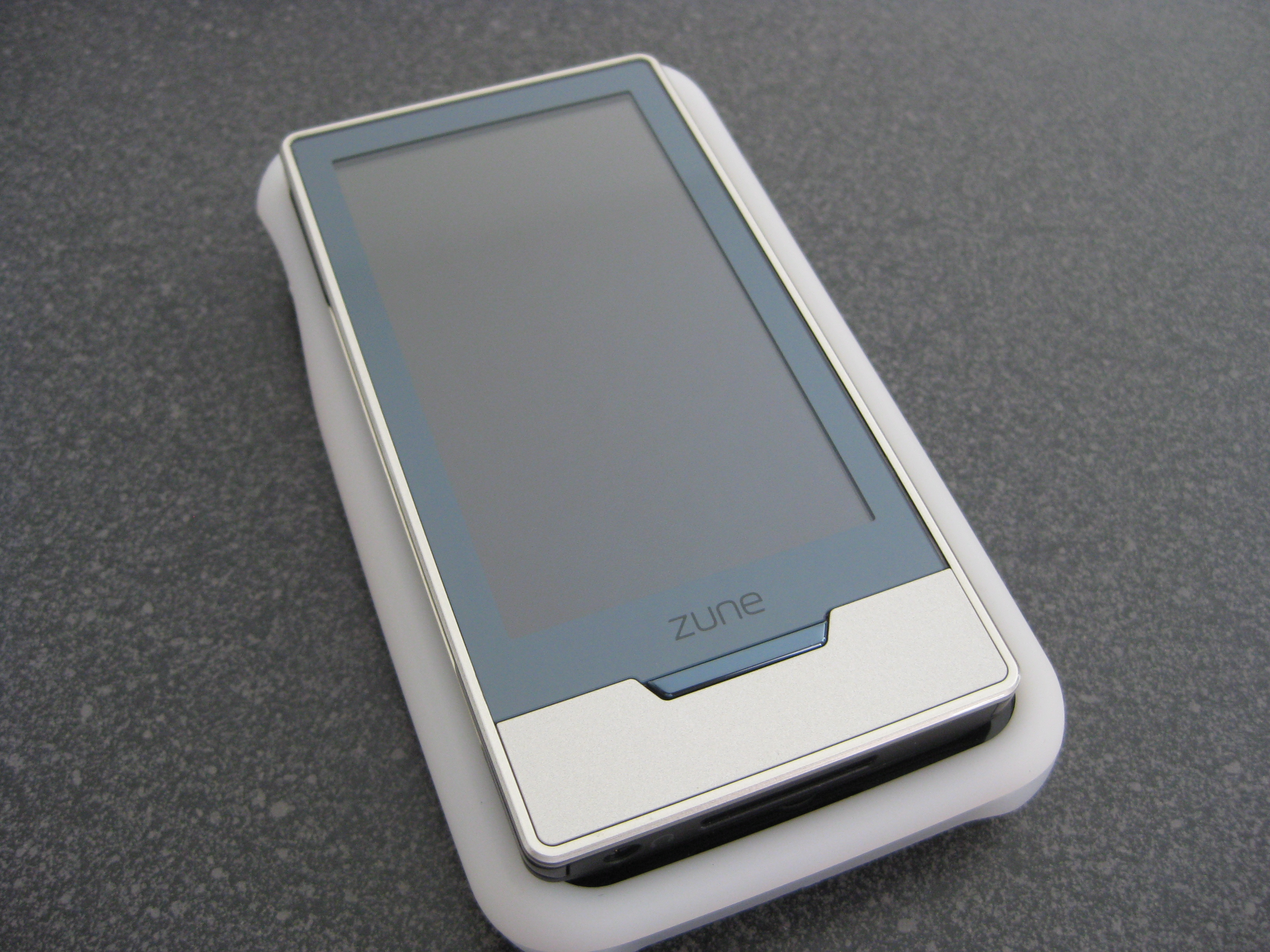 Zune HD Unboxing